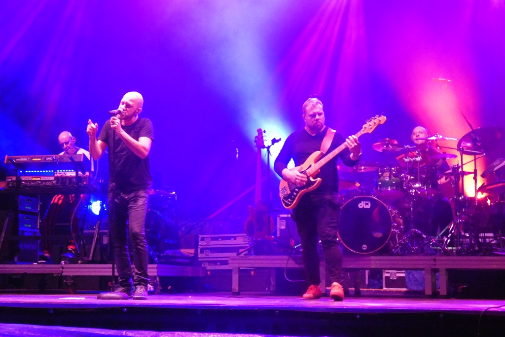 Kombi, Nowa Dęba 2019-06-16